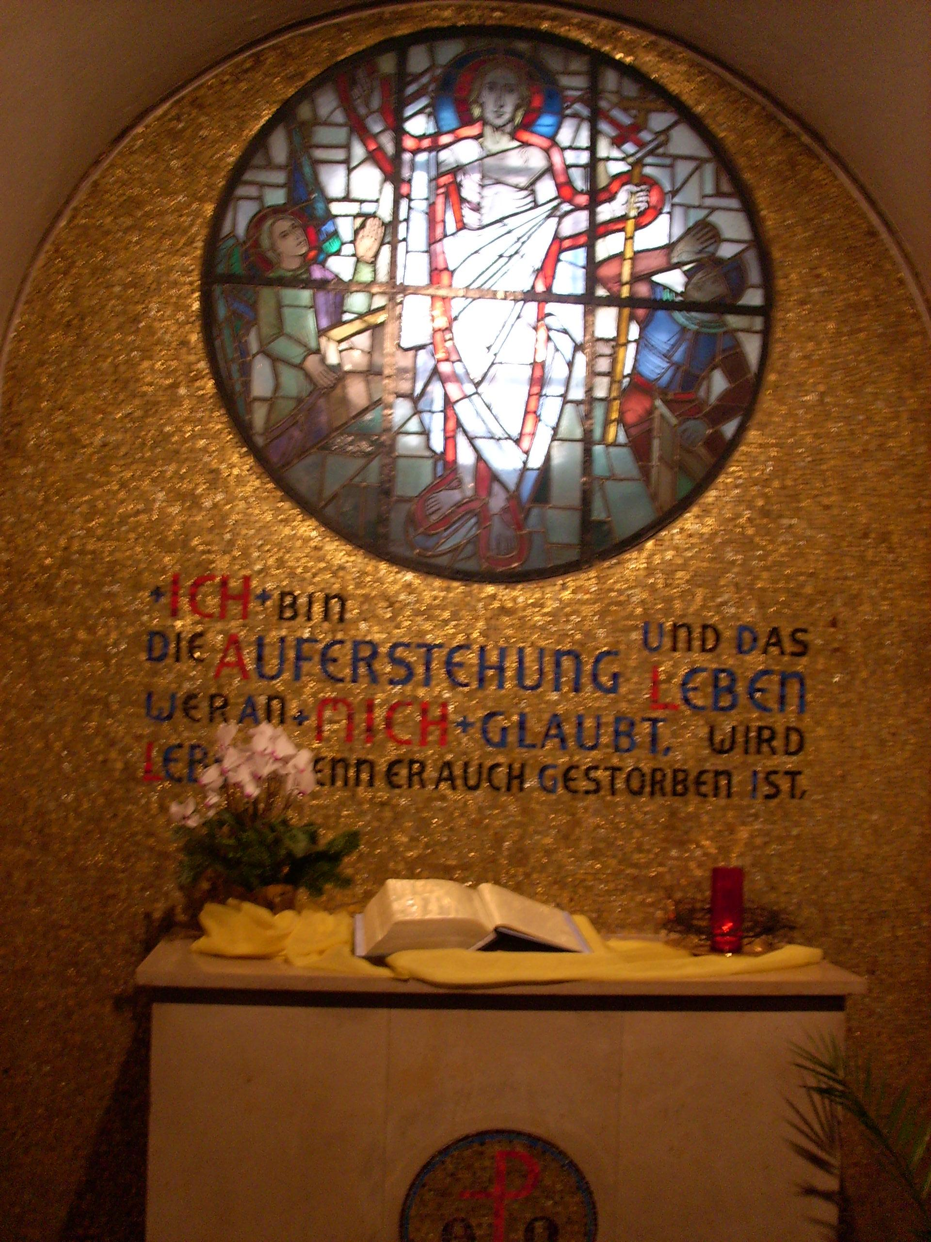 Blick zum Gefallenen-Gedächtnis-Altar in der Herz-Jesu-Kirche (Weiden in der Oberpfalz), Deutschland.